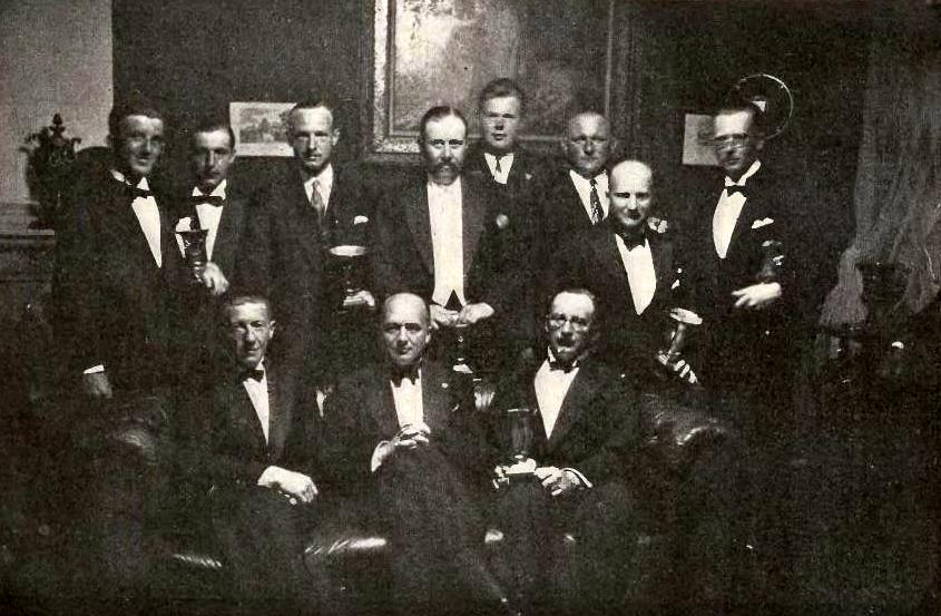 Zwycięzcy Rajd Polski 1930, siedzą od lewej: Henryk Liefeldt, Janusz Regulski, Adam Potocki, stoją od lewej: Janusz Piotrowski, Michał Bitny-Szlachta, Zygmunt Rahenfeldt, Maurycy Potocki, Włodzimierz Kurec, Euzebiusz Dzierliński, Wacław Krzeczkowski, Witold Rychter